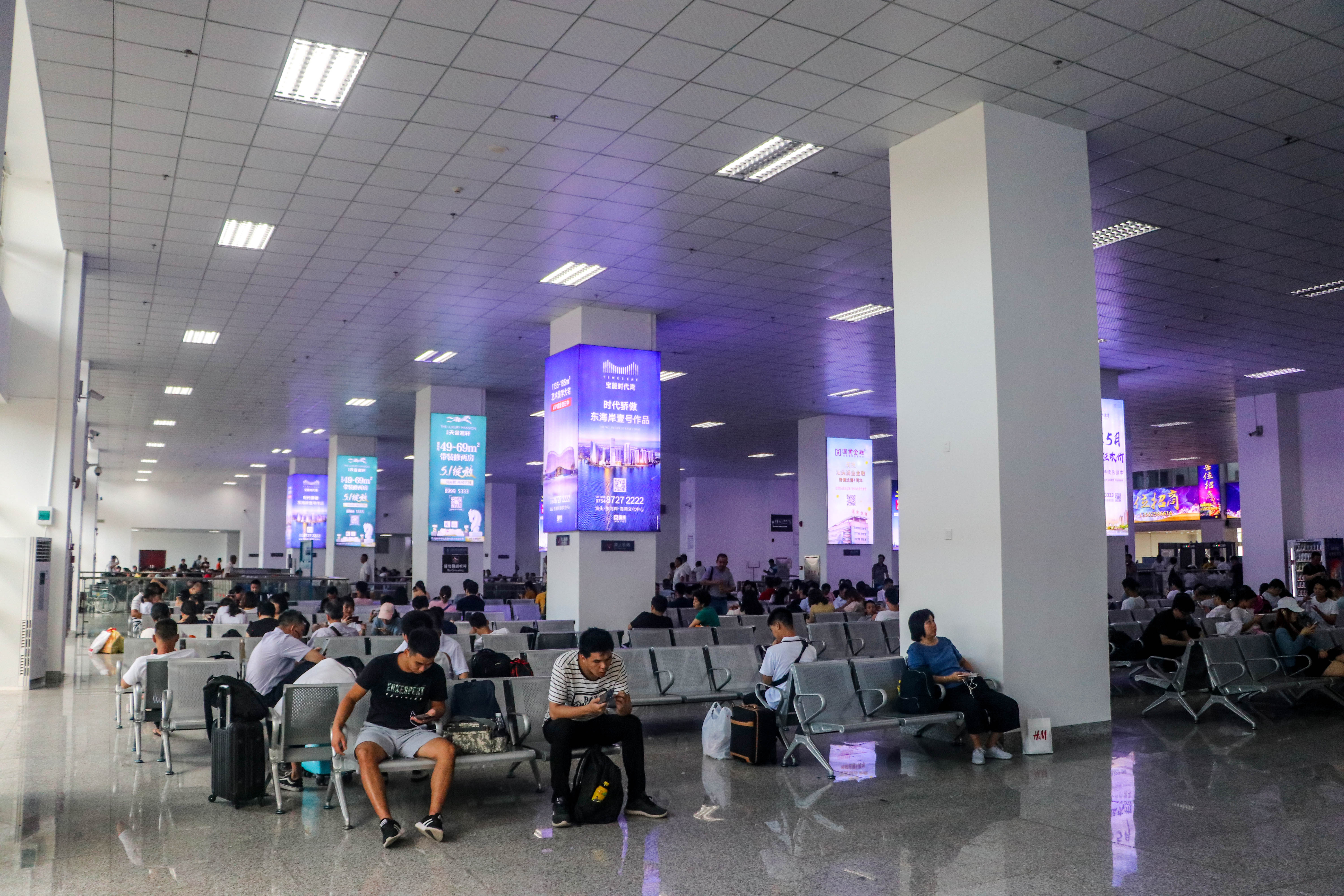 汕头站候车区